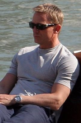 Daniel Craig cropped